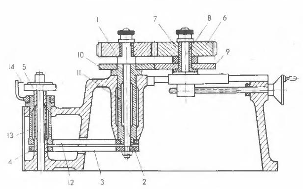 Ատամնանիվի կինեմսւտիկակսւն անճշտությունների ստուգման սարքի սխեմա։